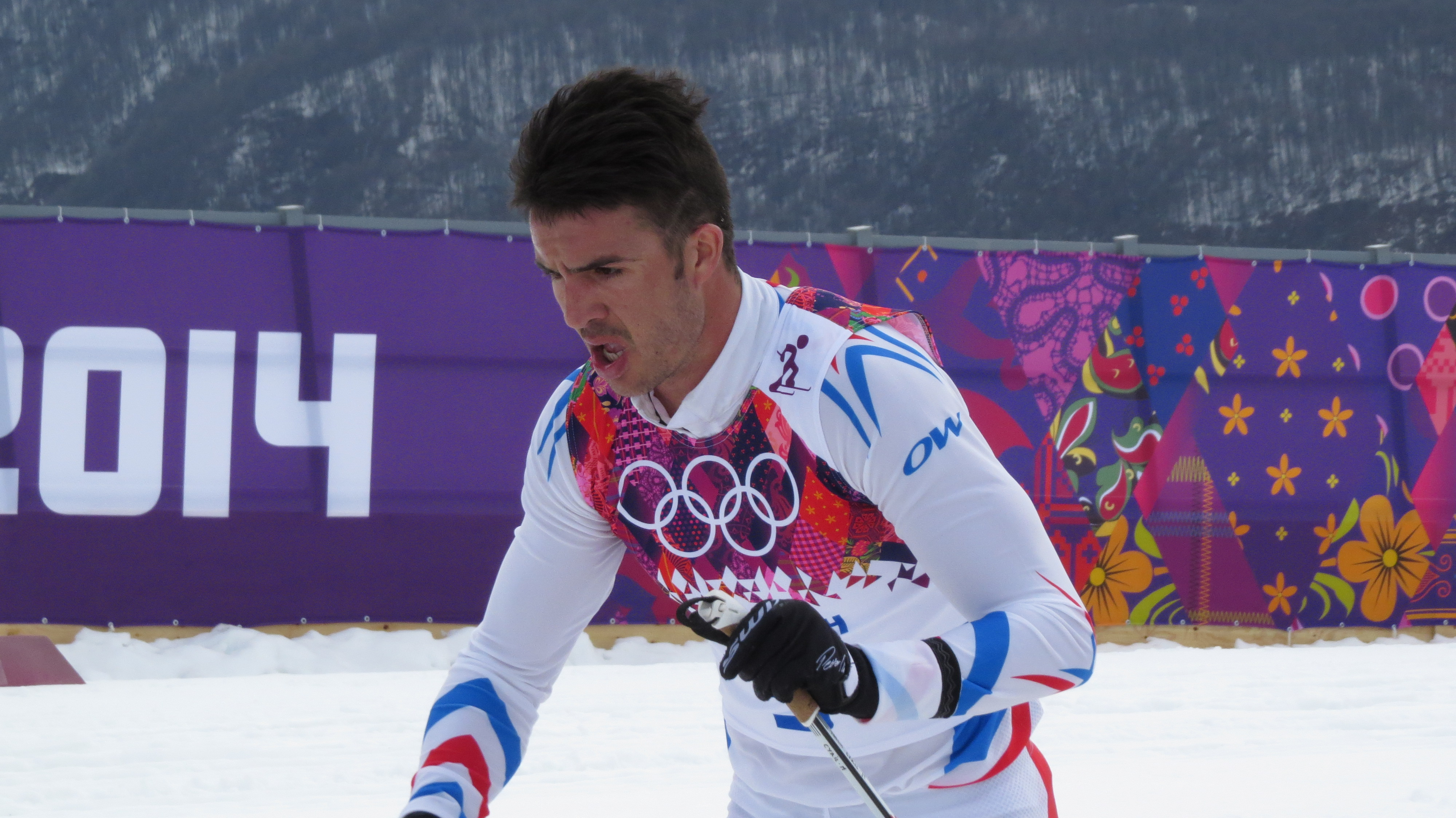 Лыжные гонки на зимних Олимпийских играх 2014 — 15 км классическим стилем (мужчины)